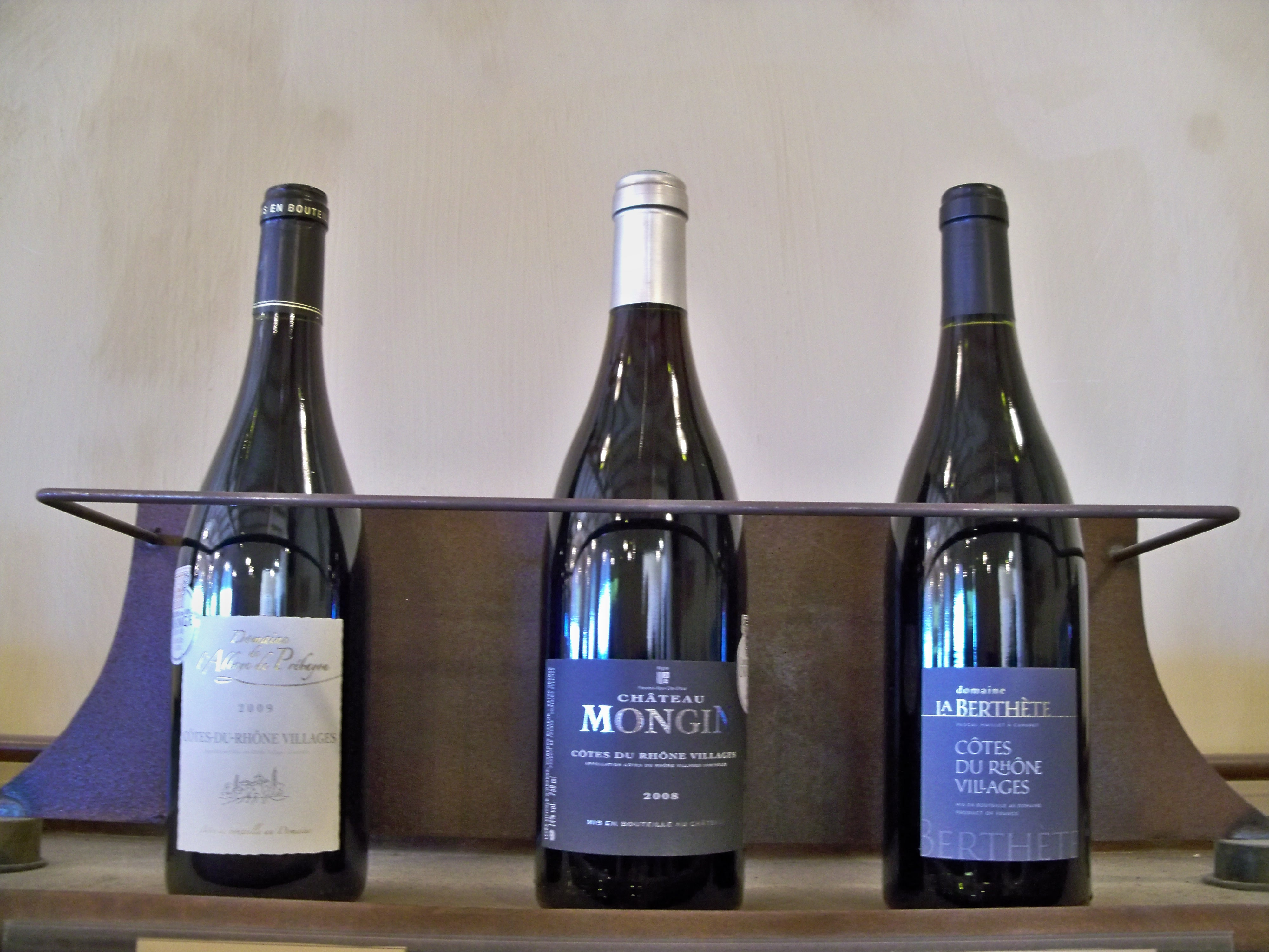 3 bouteilles de Côtes du Rhône Village